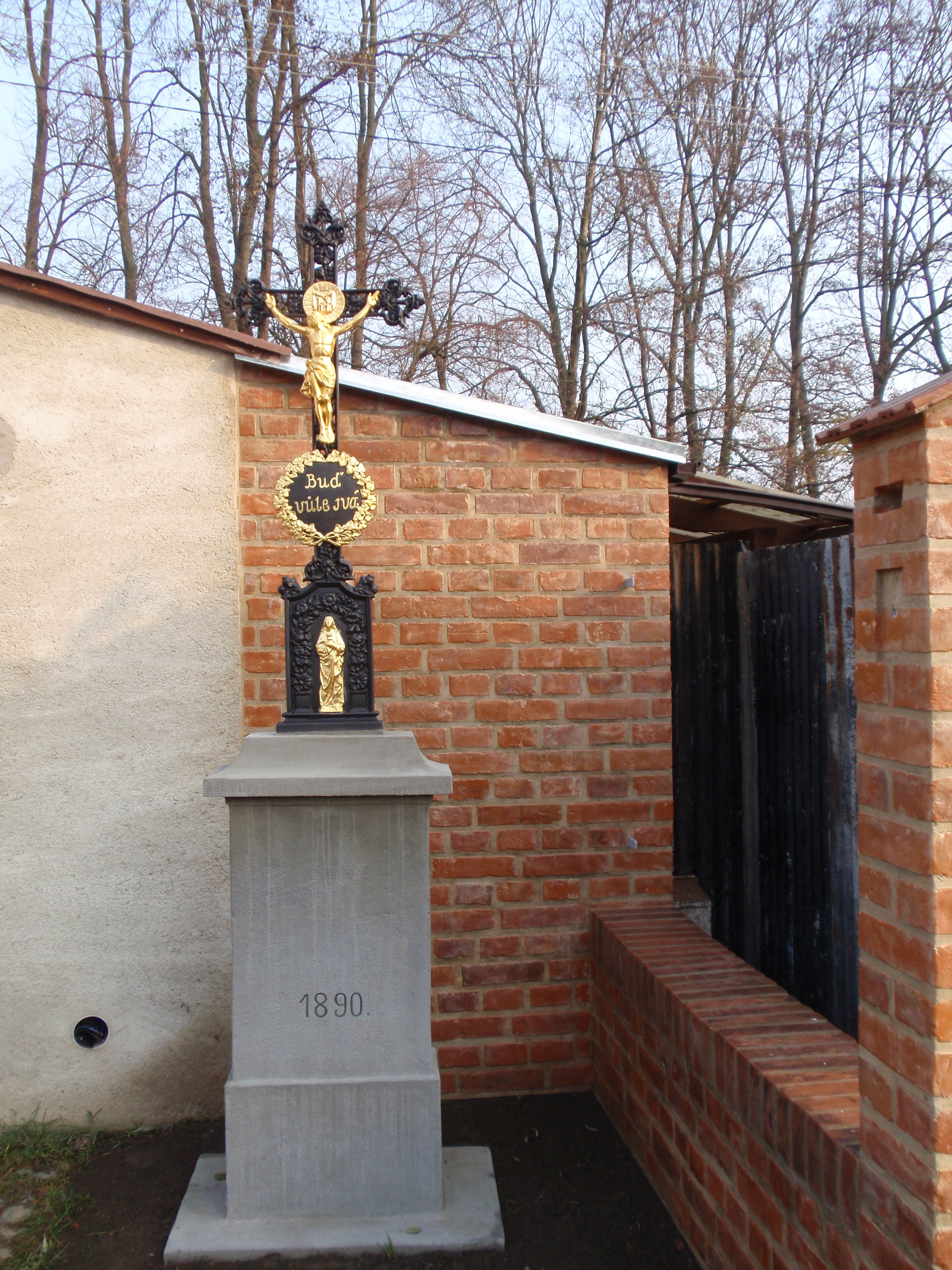 Socha ukřižovaného Krista z roku 1890 na Pazderně